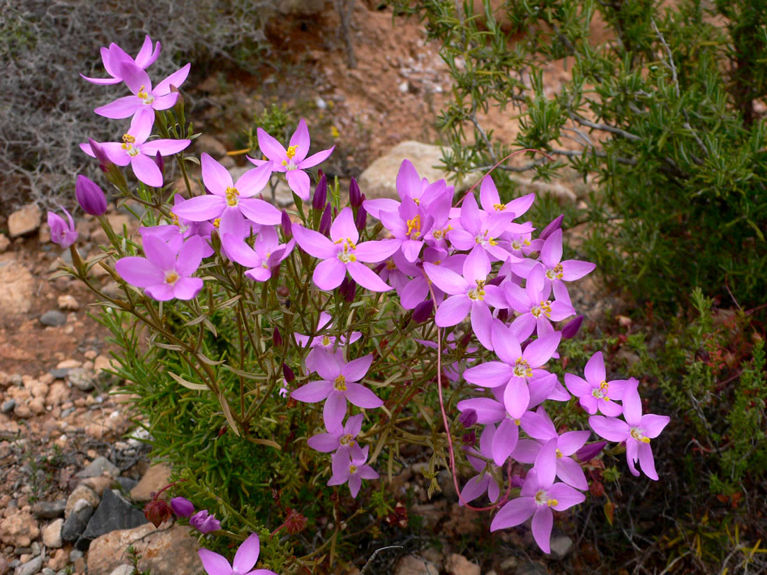 Centaurium quadrifolium en el Parque natural de la Sierra de la Muela en Cartagena (Spain)